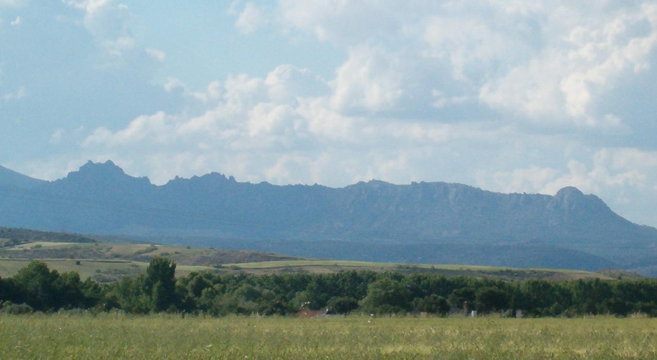 Se aprecia la silueta de la cara sur de la sierra. A la izquierda de la fotografía se encuentra el Cancho Gordo y a la derecha el Pico de la Miel.